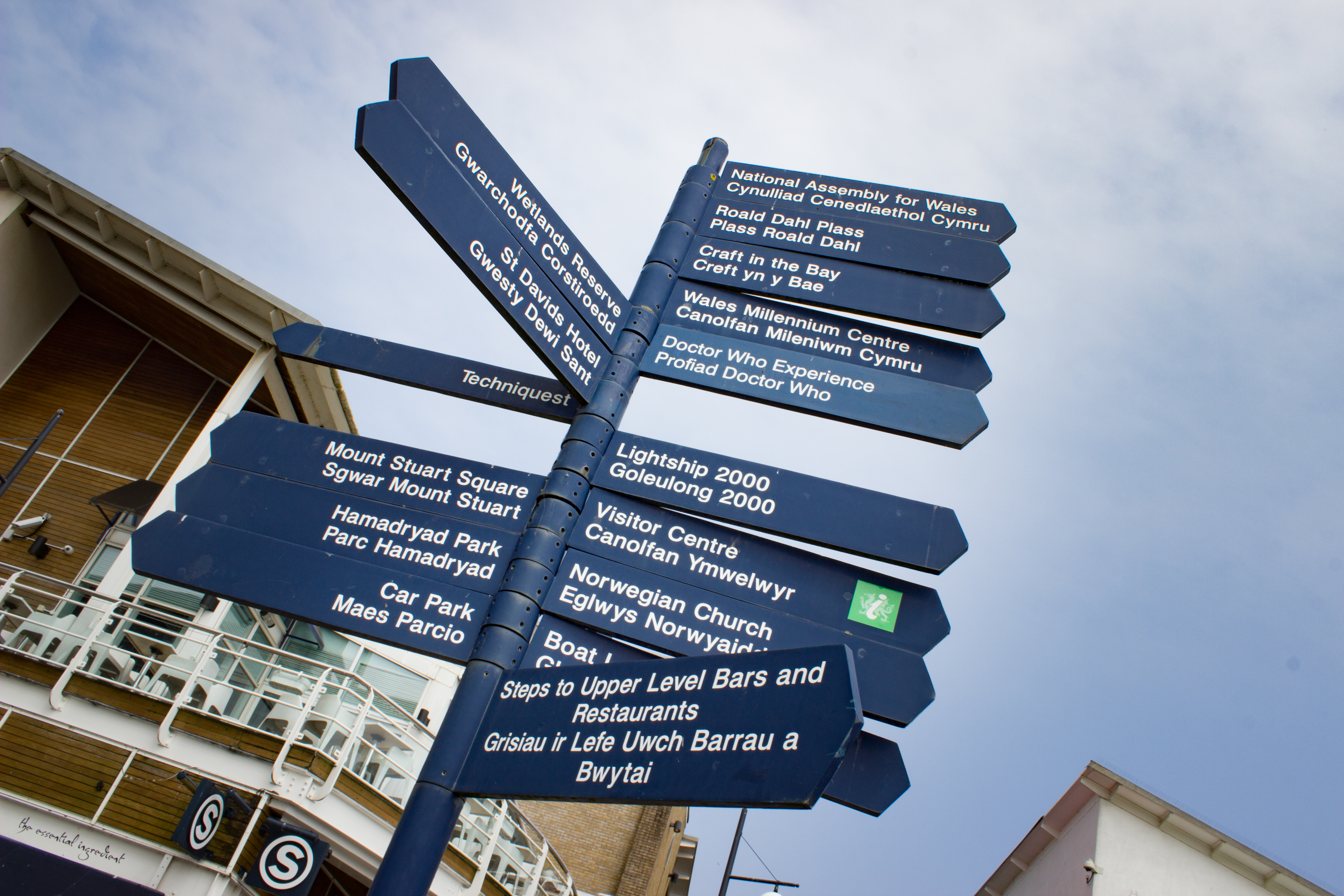 Panneau bilingue Anglais-Gallois à Cardiff Bay